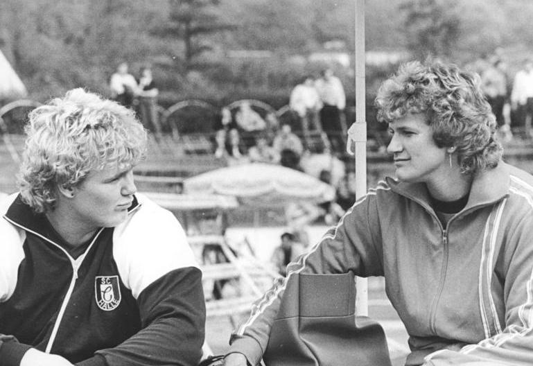 Gabi Reinsch, Ilke Wyludda im Gespräch ADN-ZB Kasper 4.6.88 Jena: Olympia-Qualifikation der Leichtathleten- Das Diskuswerfen der Frauen gewann Gabi Reinsch (SC Cottbus, r.) mit 71,64 m. Ilke Wyludda (SC Chemie Halle, l.) belegte den 3. Platz.